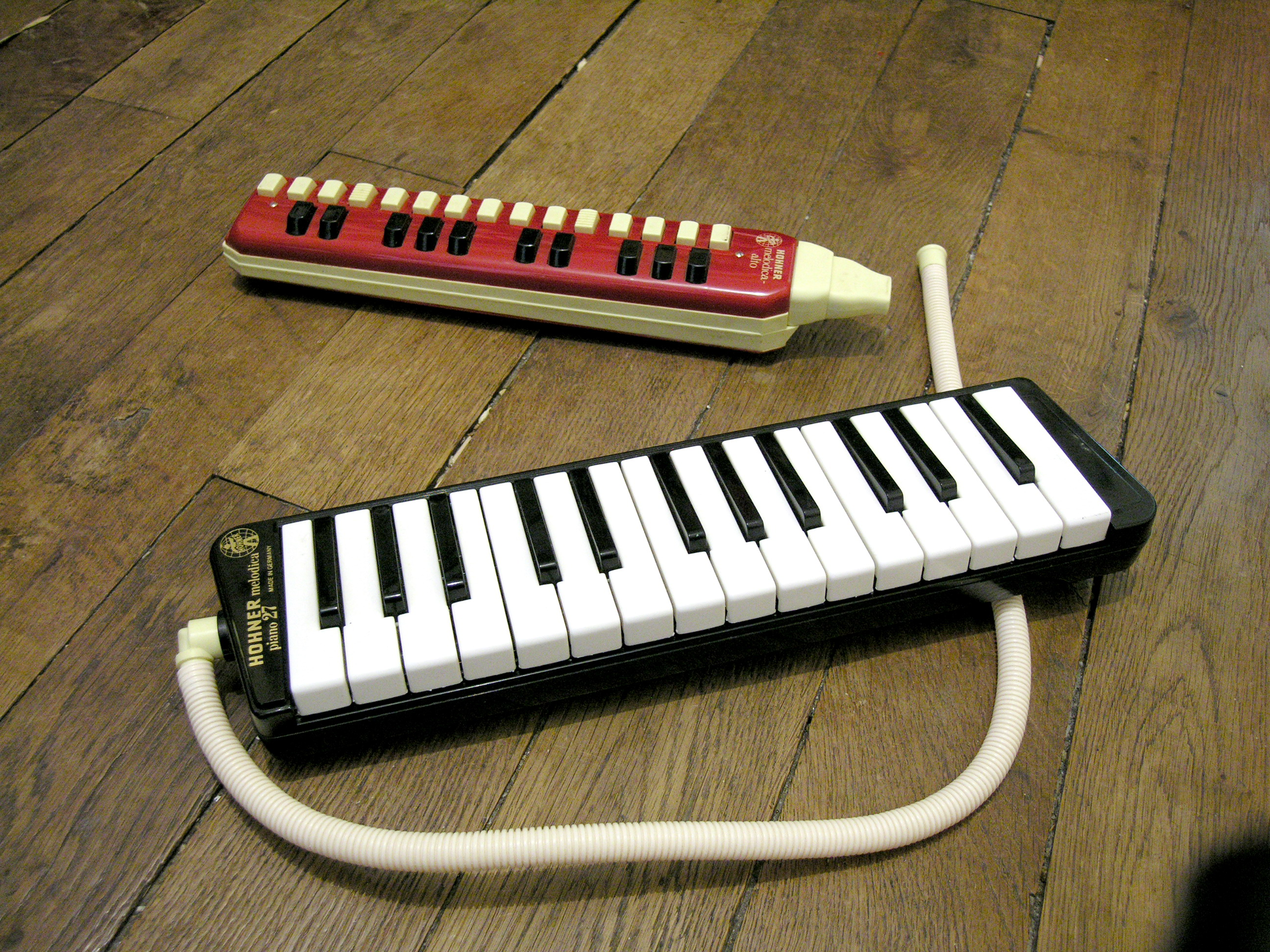 Deux modèles de Mélodicas de marque Hohner Auteur : Ukulele ✉ 3 avril 2006 à 14:30 (CEST) 2006